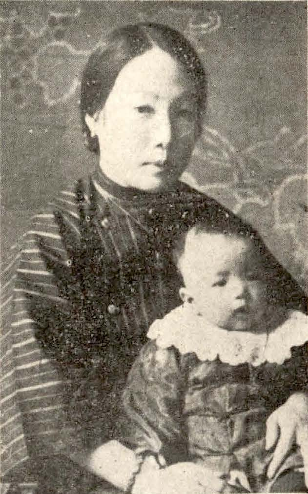 Bân-lâm-gú: Lí Jû-goat 李如月